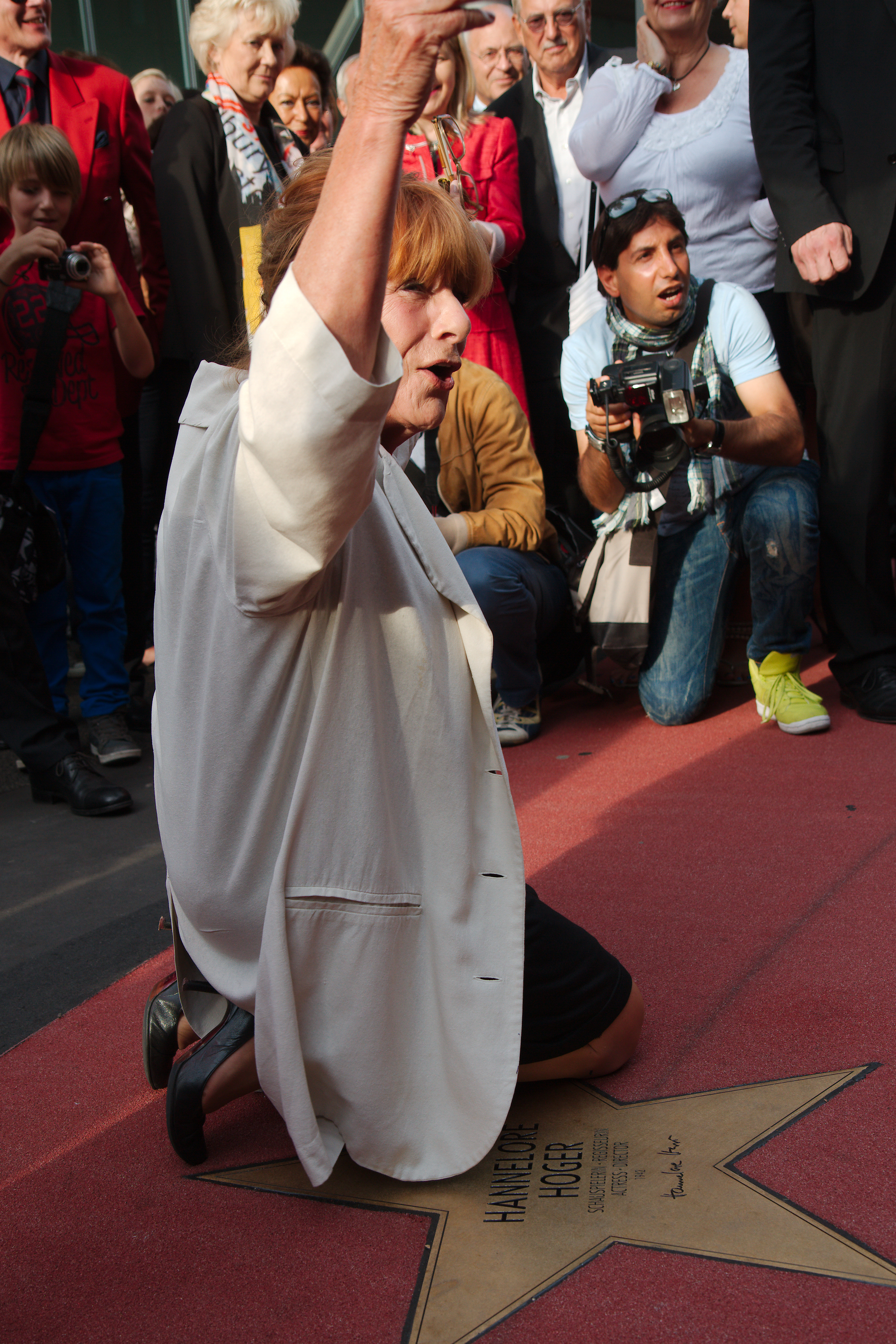 Sie weihte ihren Stern ein.